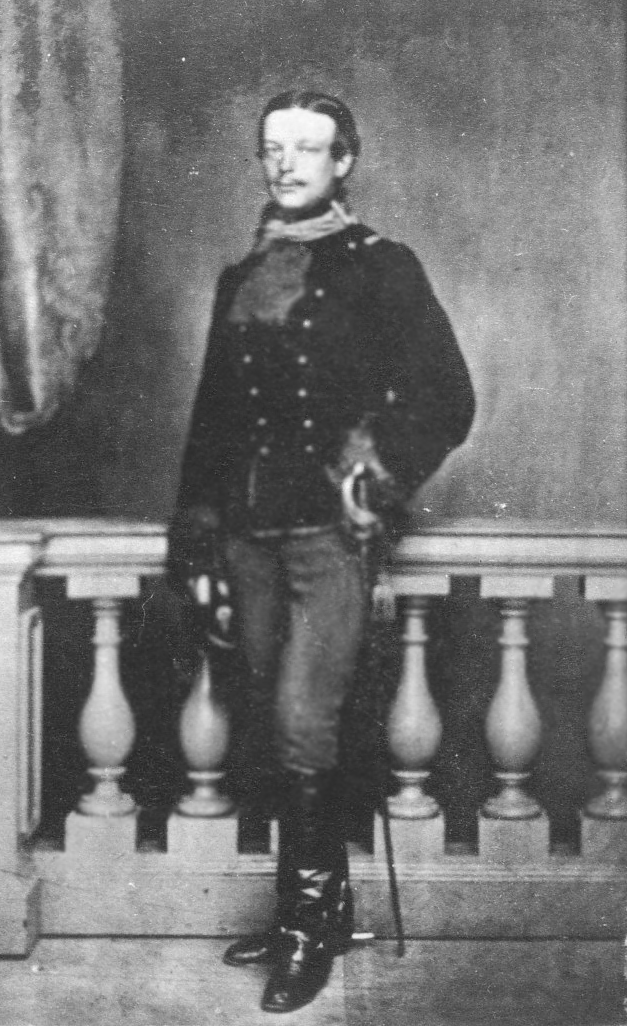 gen. Zygmunt Jordan